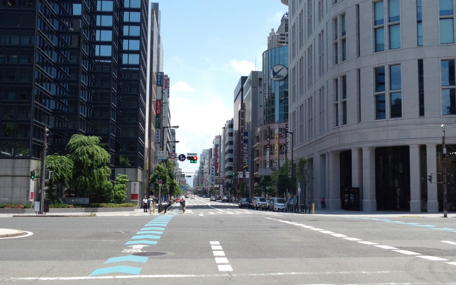 本町通・本町三交差点